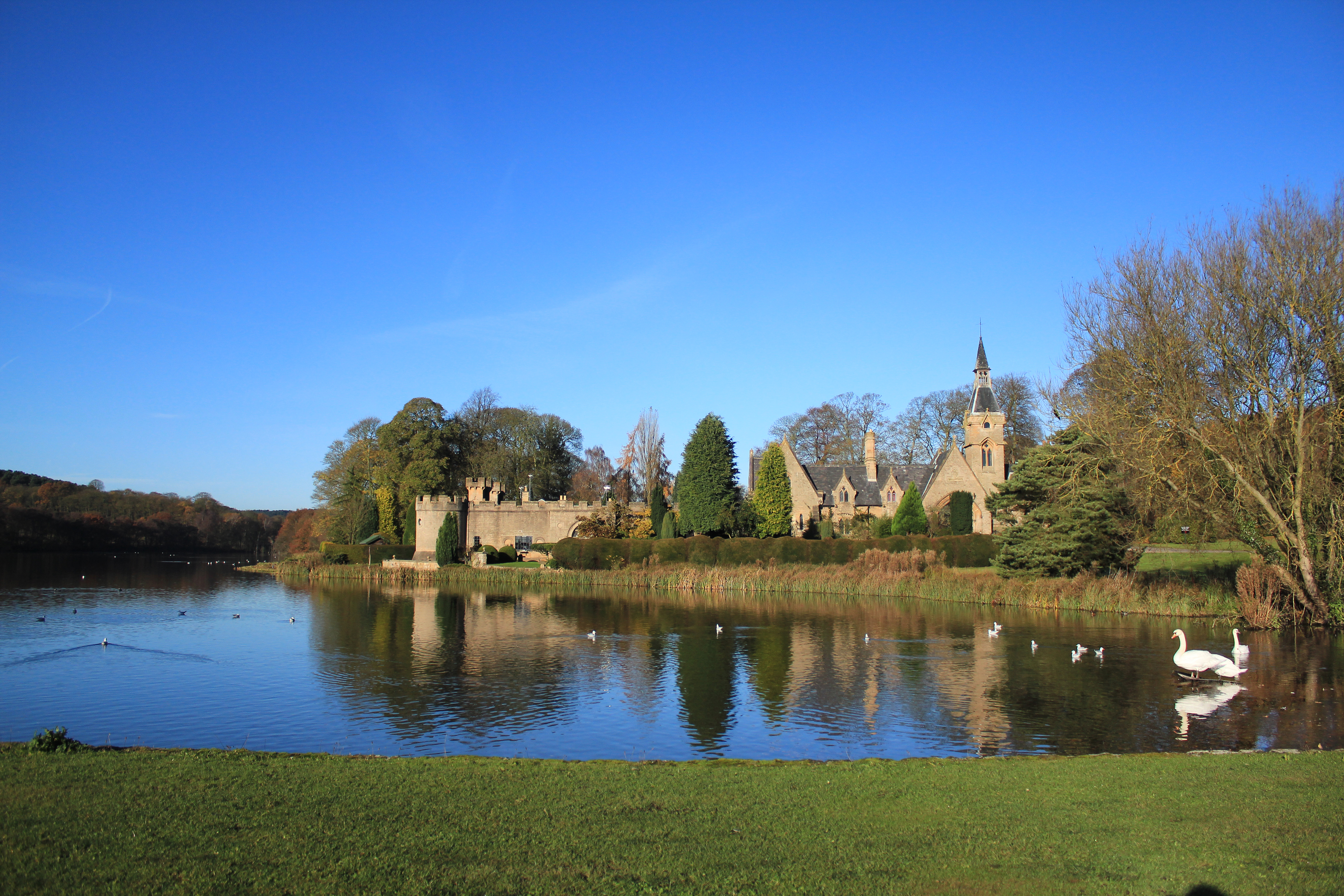 Scheinfort und Stallkomplex am Upper Lake von Newstead Abbey